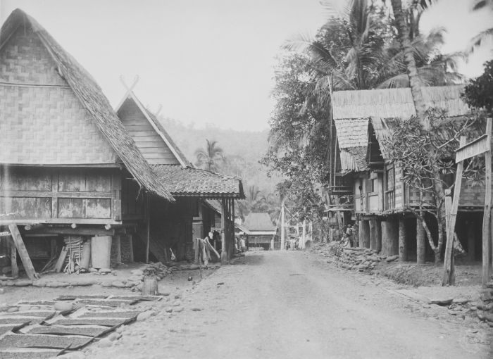 Foto. Straatgezicht in Padangbindoe